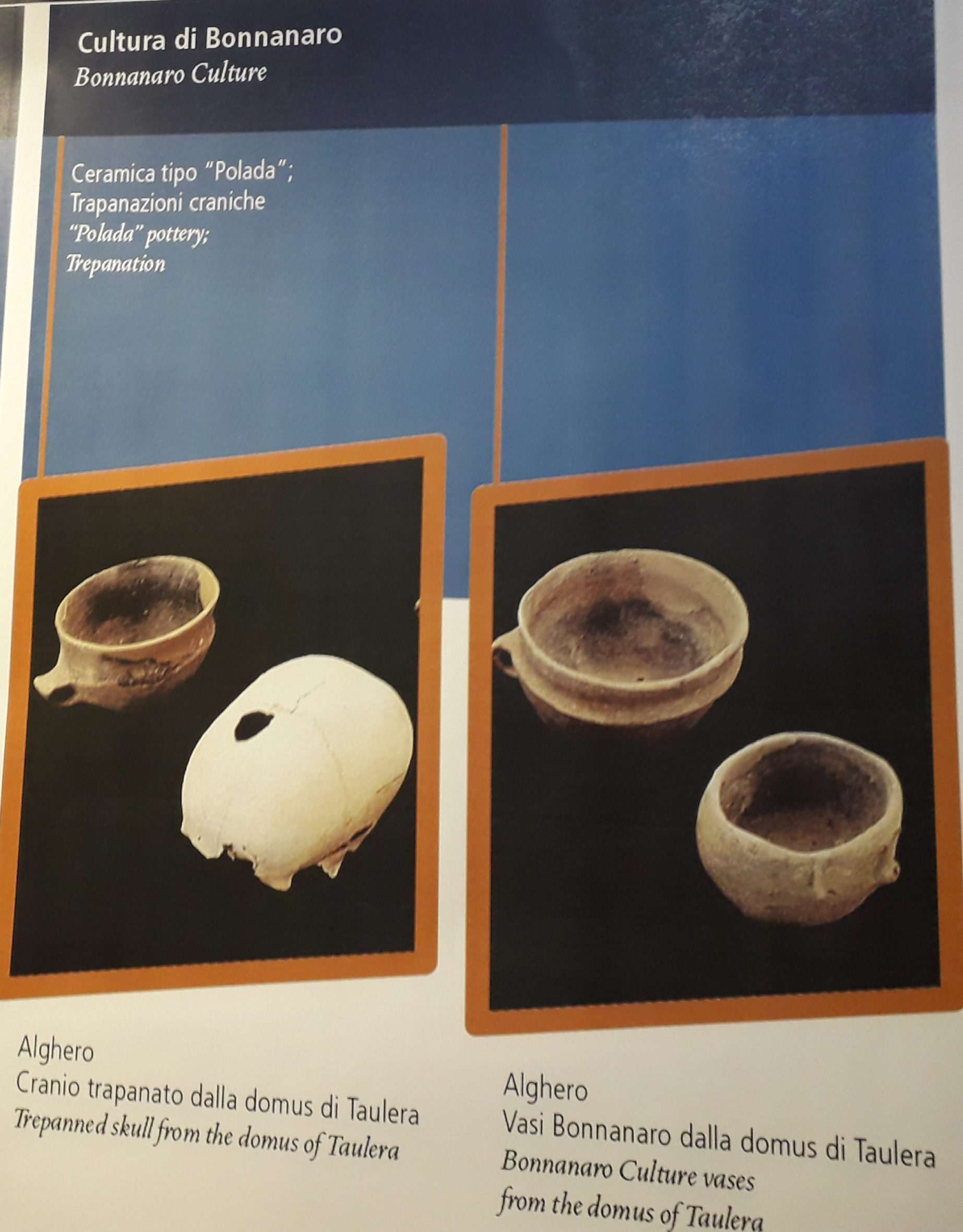 Pannello informativo sulla cultura di Bonnanaro, mostra aeroporto Cagliari Elmas